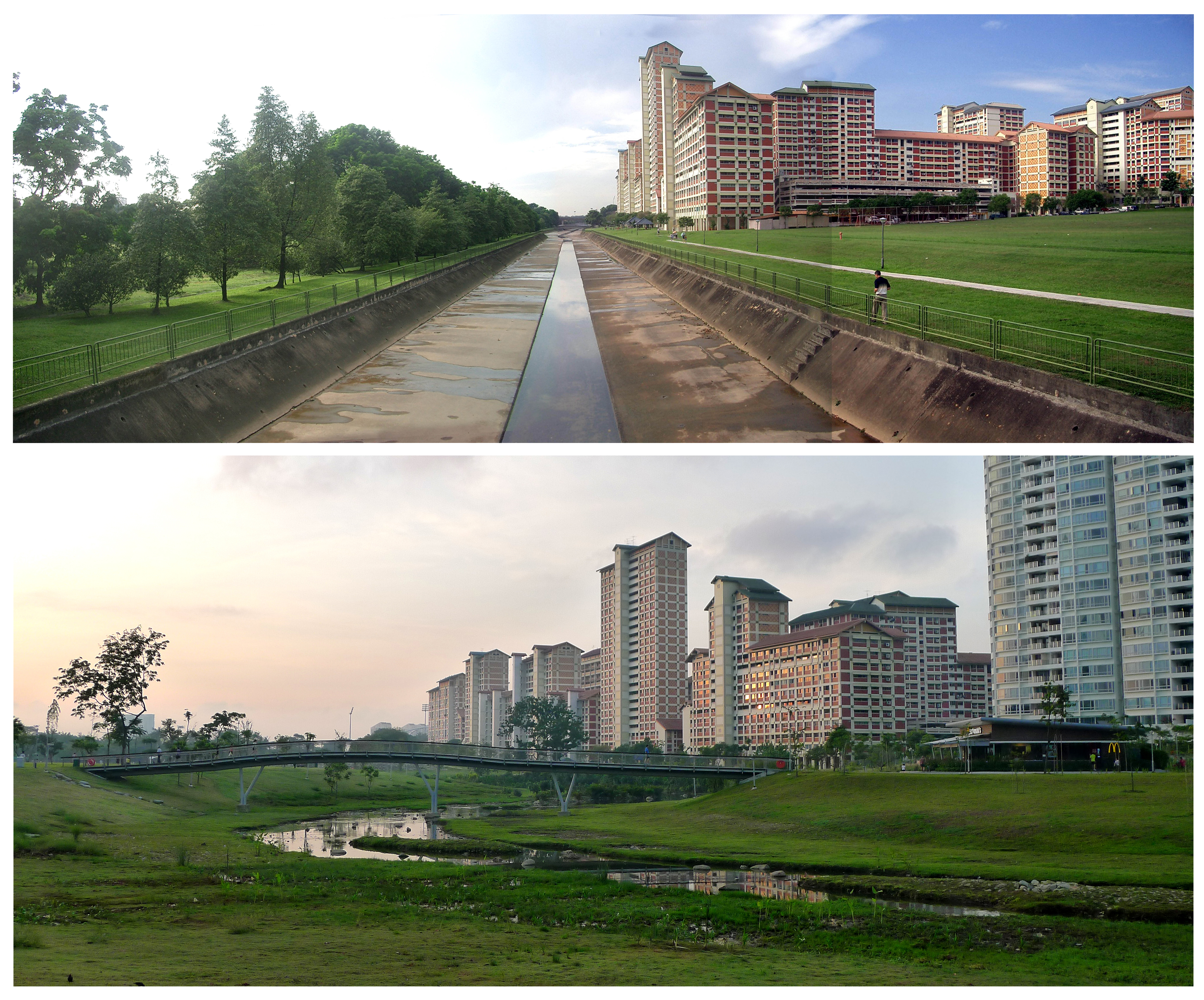 Bishan Park vor der Renaturierung (oben) und nach der Renaturierung (unten)